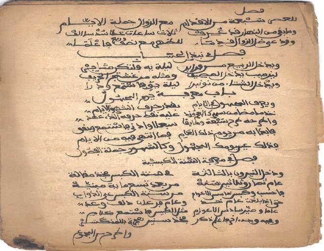 Traité de mathématique sous forme poétique retrouvé dans la bibliothèque du Cheikh el Mouhoub (Kabylie du XIXe siècle).Copie datée XIXe siècle d'un manuscrit de Al Akhdari, mathématicien algérien de Biskra du XVIe siècle.